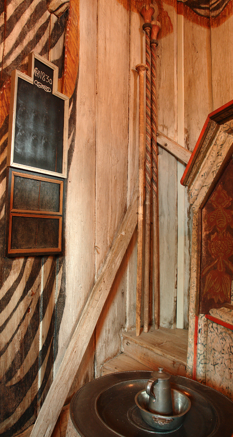 Stabkirche von Hedared: zwei geschnitzte Florstäbe und ein Stoßstab (zum aufwecken eingeschlafener Kirchenbesucher)